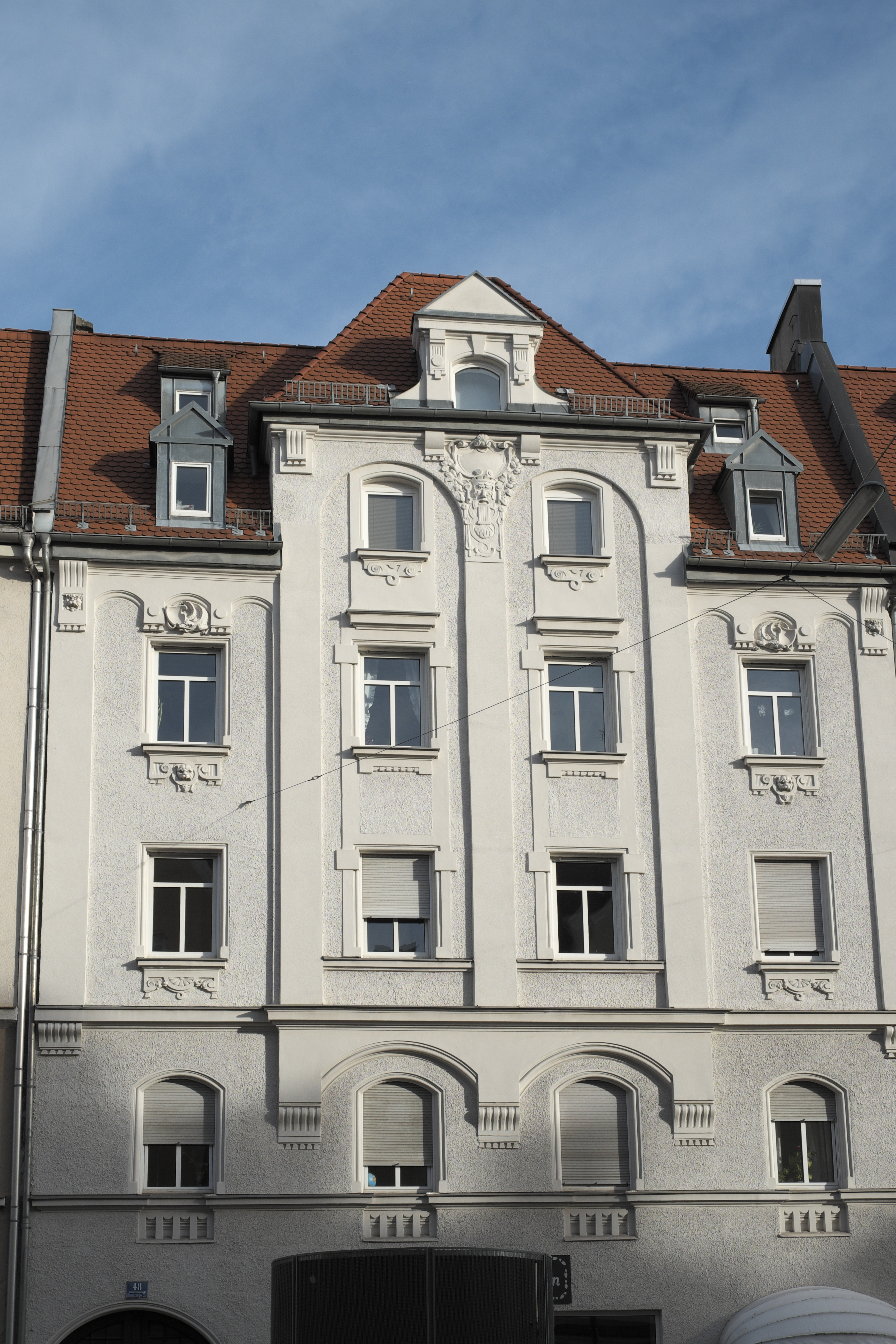 Mietshaus in der Donnersbergerstraße 48 in Neuhausen im Stadtbezirk Neuhausen-Nymphenburg in München (Bayern/Deutschland), um 1900